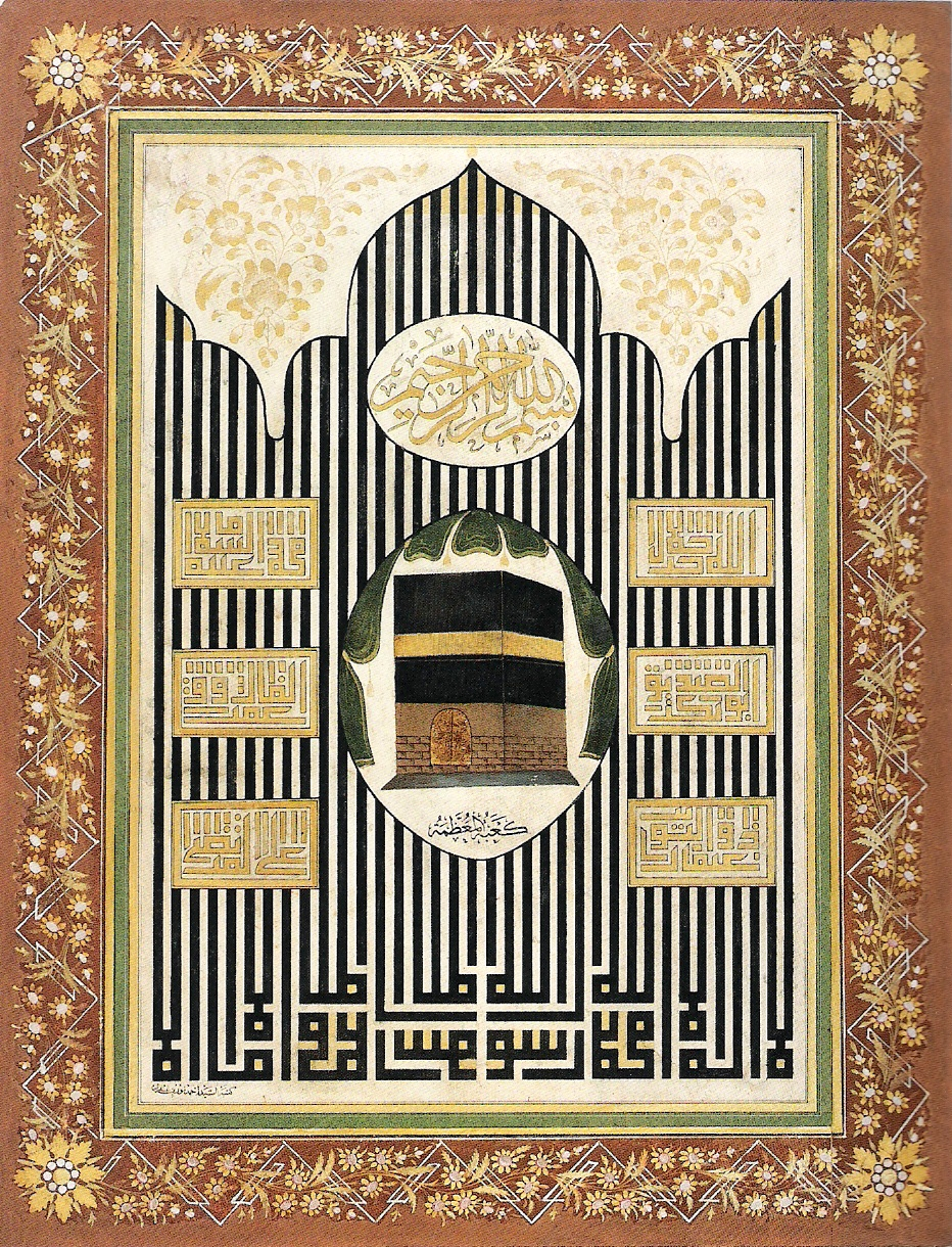 Das muslimische Glaubensbekenntnis im Stil einer mamlukischen Tughra.